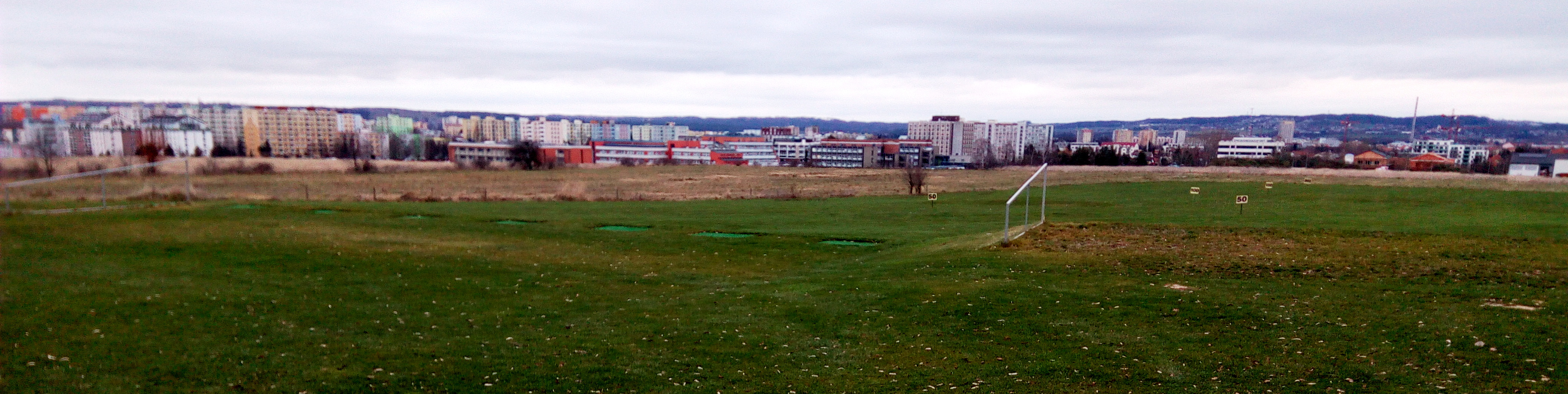 Cvičné golfové hřiště na Švábově Hrádku, návrší mezi Čtyřmi Dvory a Šindlovými Dvory v Českých Budějovicích.